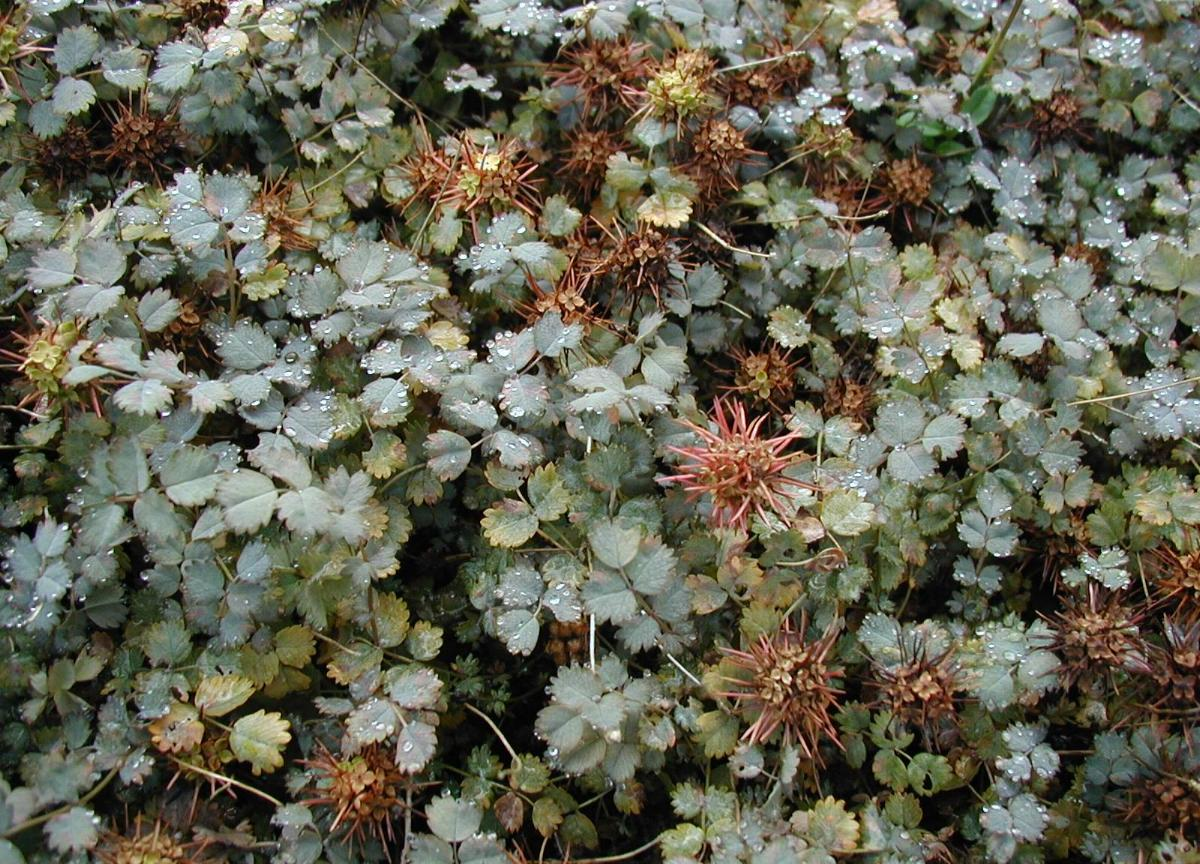 Acaena buchananii leaves and fruit.